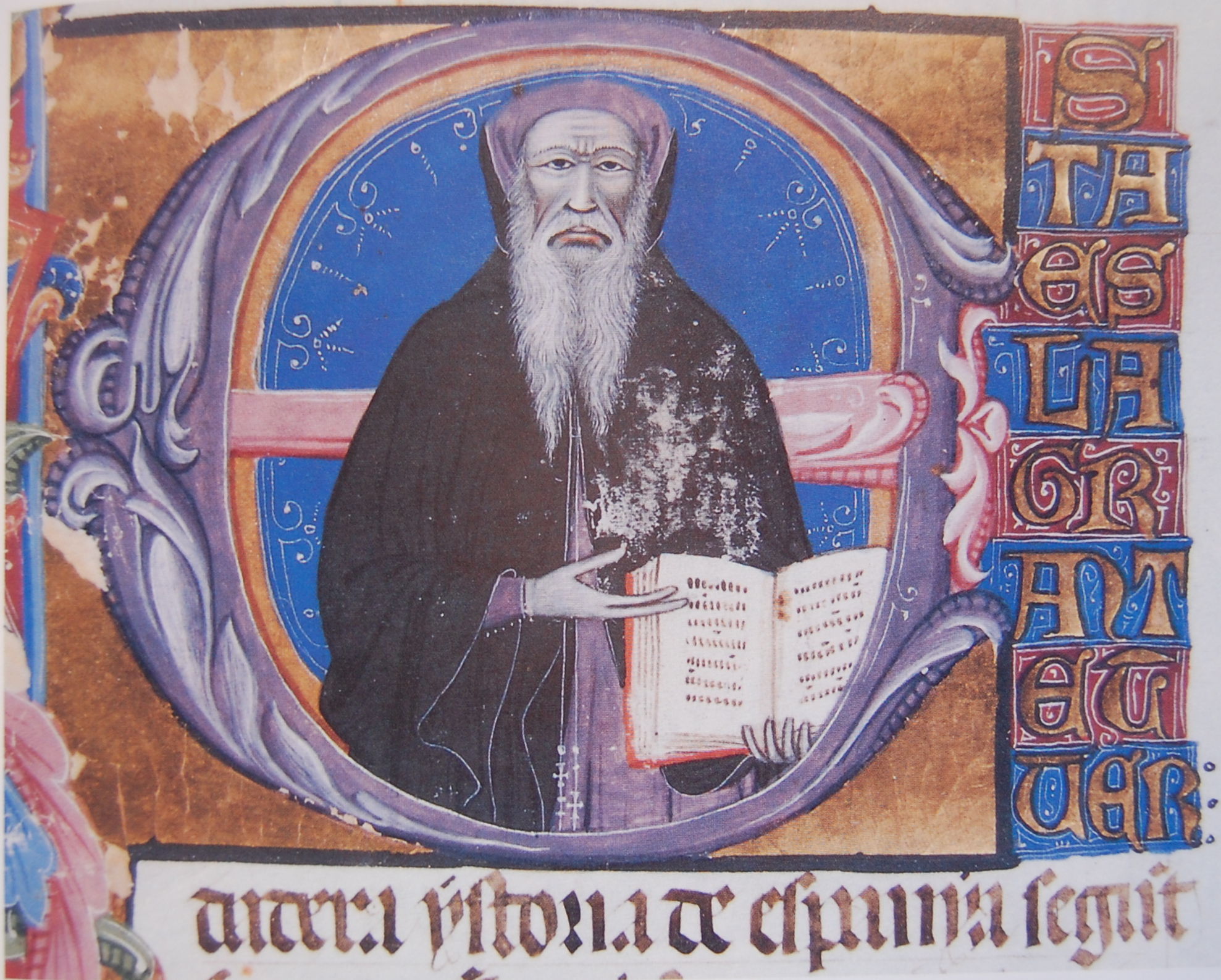 Aragonés: Retrato de Johan Ferrández d'Heredia en a E inicial d'a Grant cronica d'Espanya I